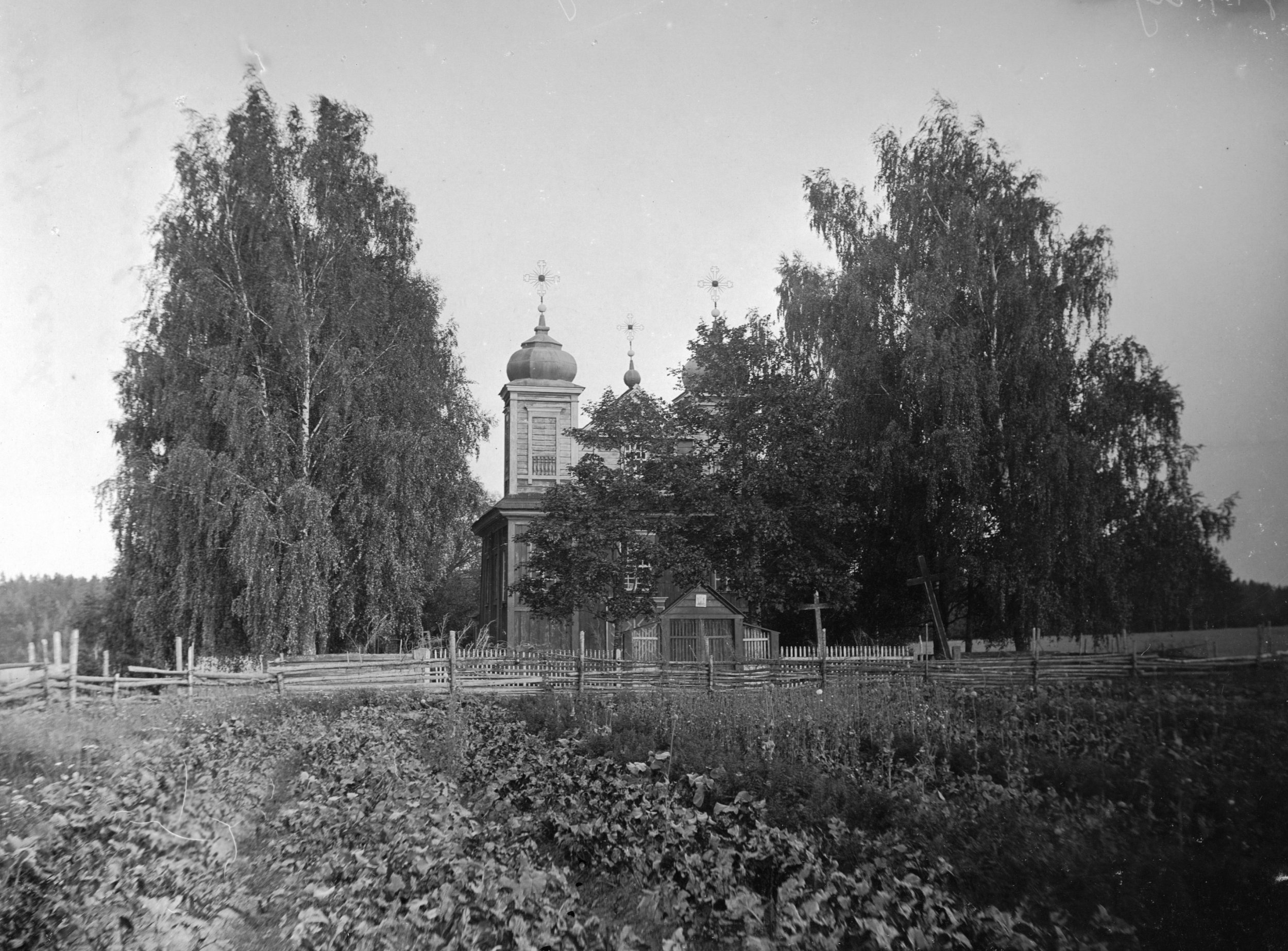 Беларуская (тарашкевіца): Вялейка (Vialejka). Спаская царква